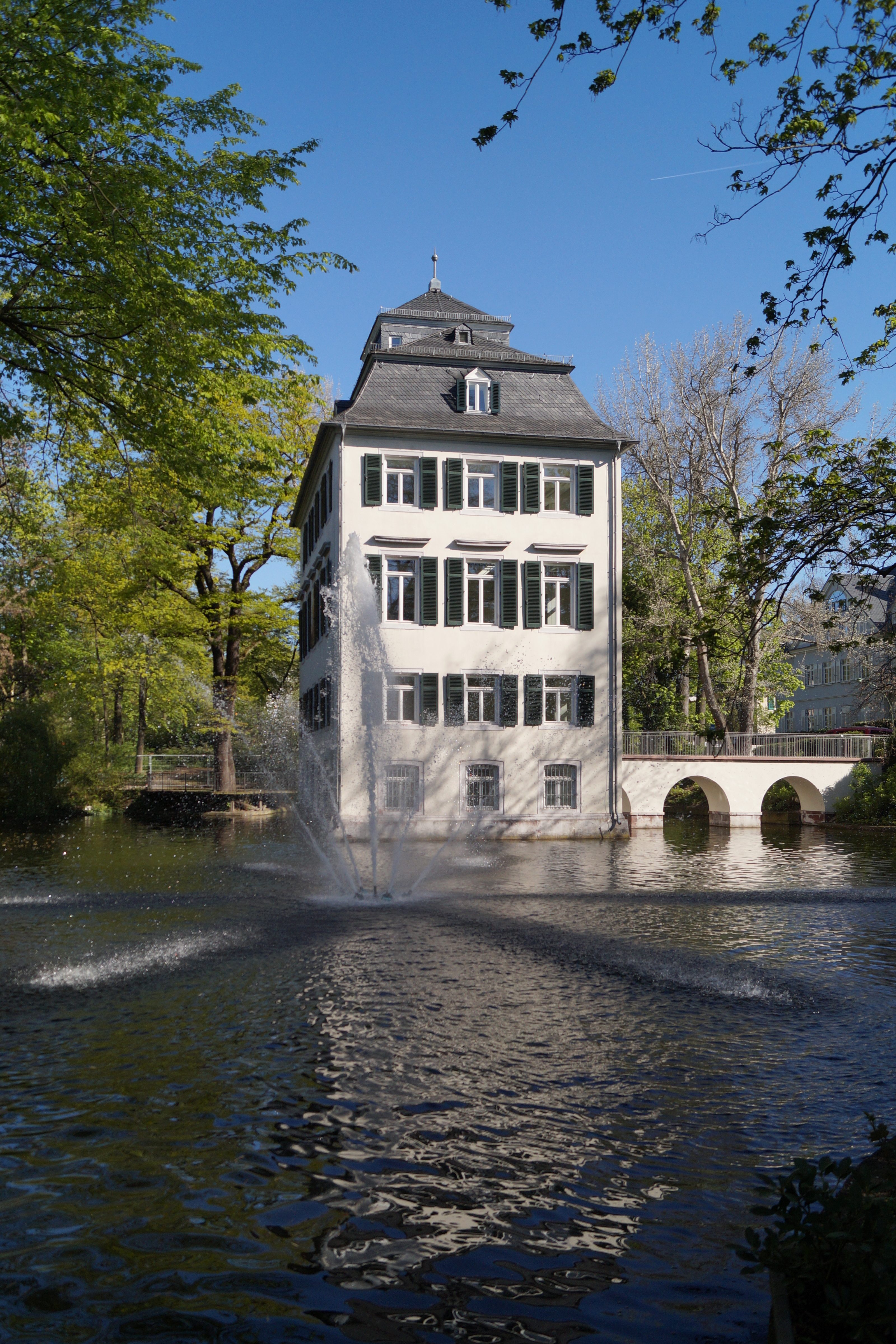 Holzhausenschlösschen in Frankfurt a.M., Ansicht von Süden.